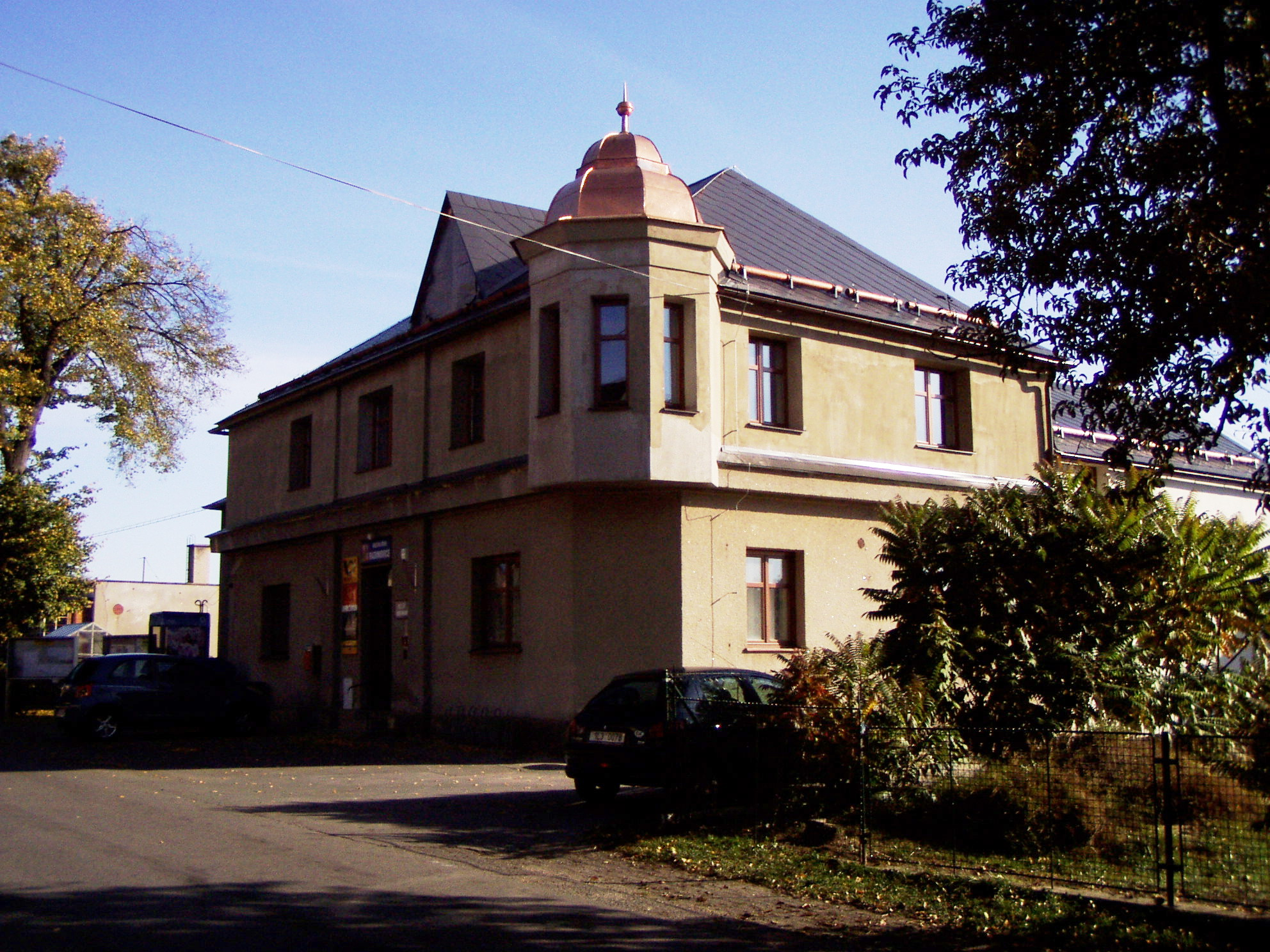 Budova obecního úřadu v Radimovicích, kde také sídlí pošta Sychrov a obecní knihovna